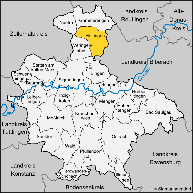 Karte der Stadt Hettingen im Landkreis Sigmaringen